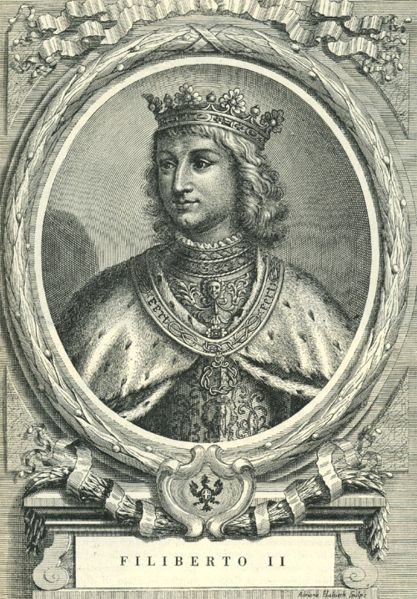 Filiberto II di Savoia (1480-1504) (Ferrero di Lavriano, Albero Gentilizio della Casa di Savoia, Torino 1701). Immagine presa da eo.wiki